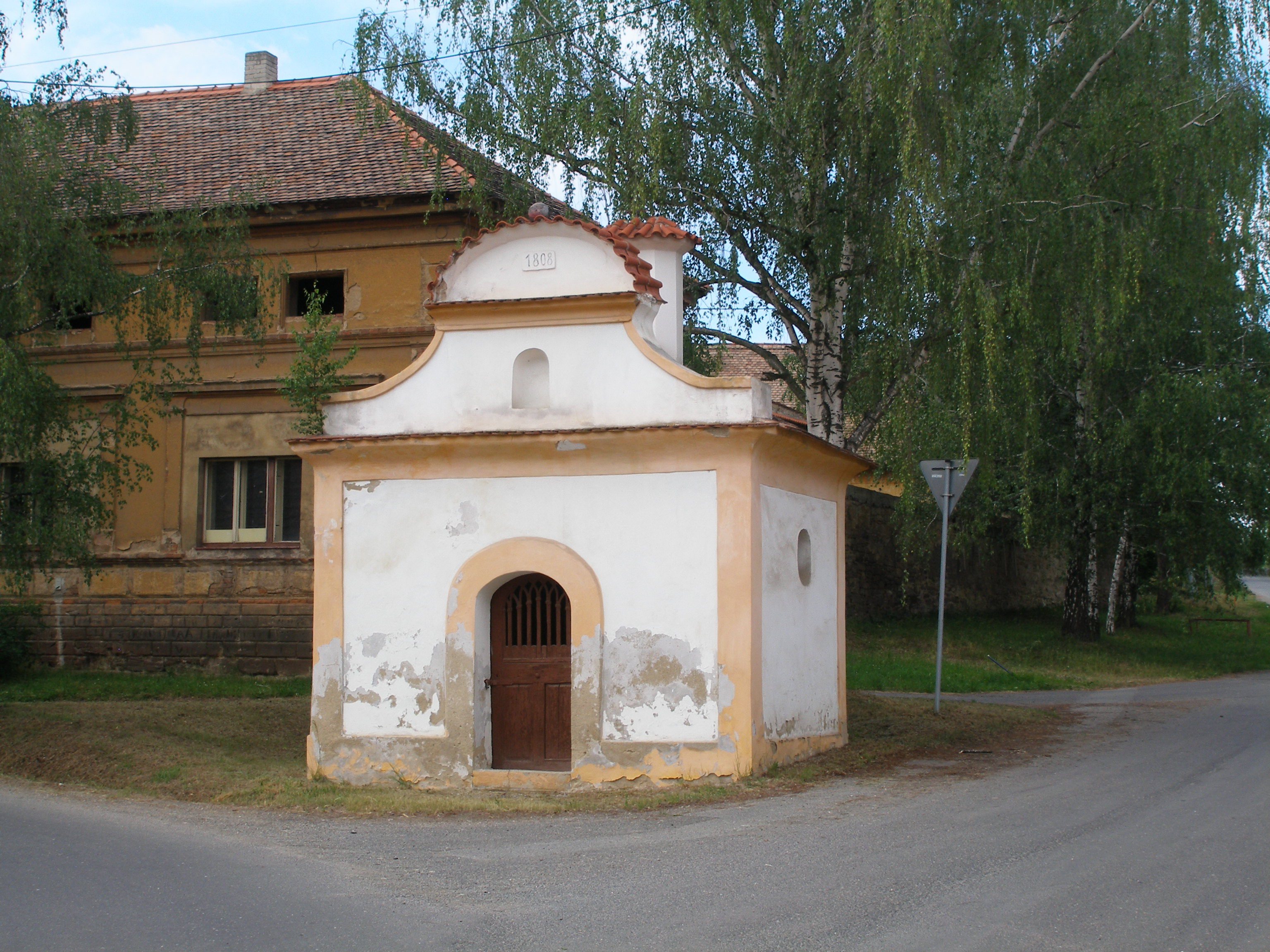 Kaplička v obci Bratkovice.